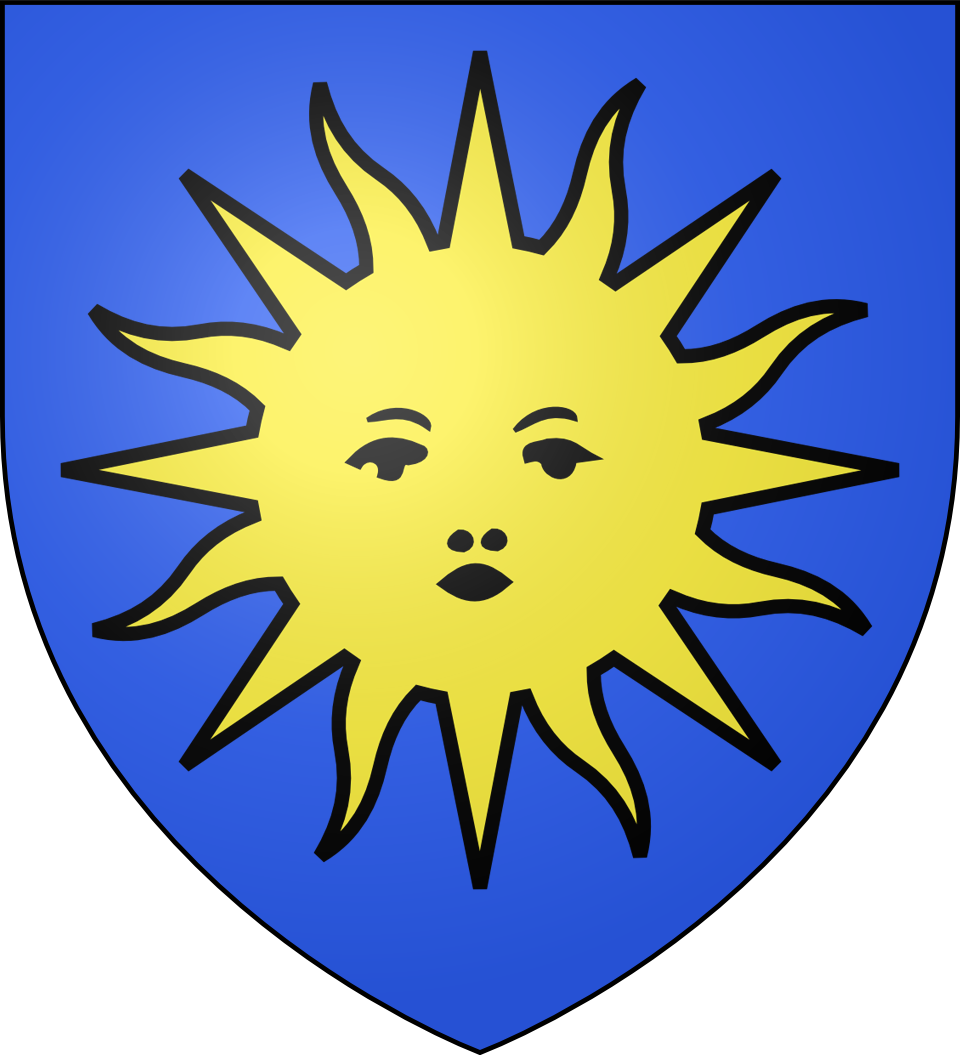 Blason de la ville de Nérac (Lot-et-Garonne) : D'azur au soleil d'or